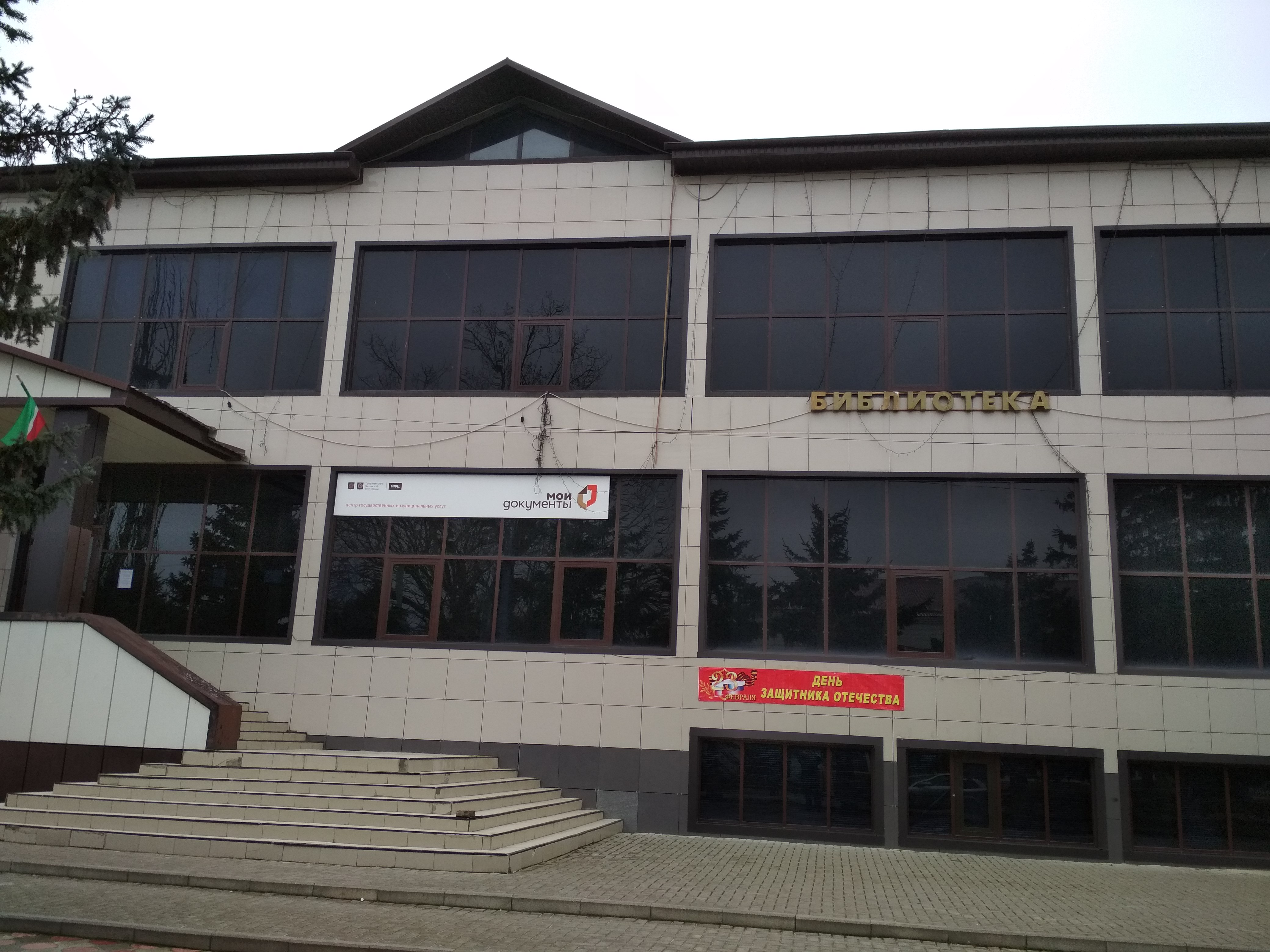 Нохчийн: Библиотека